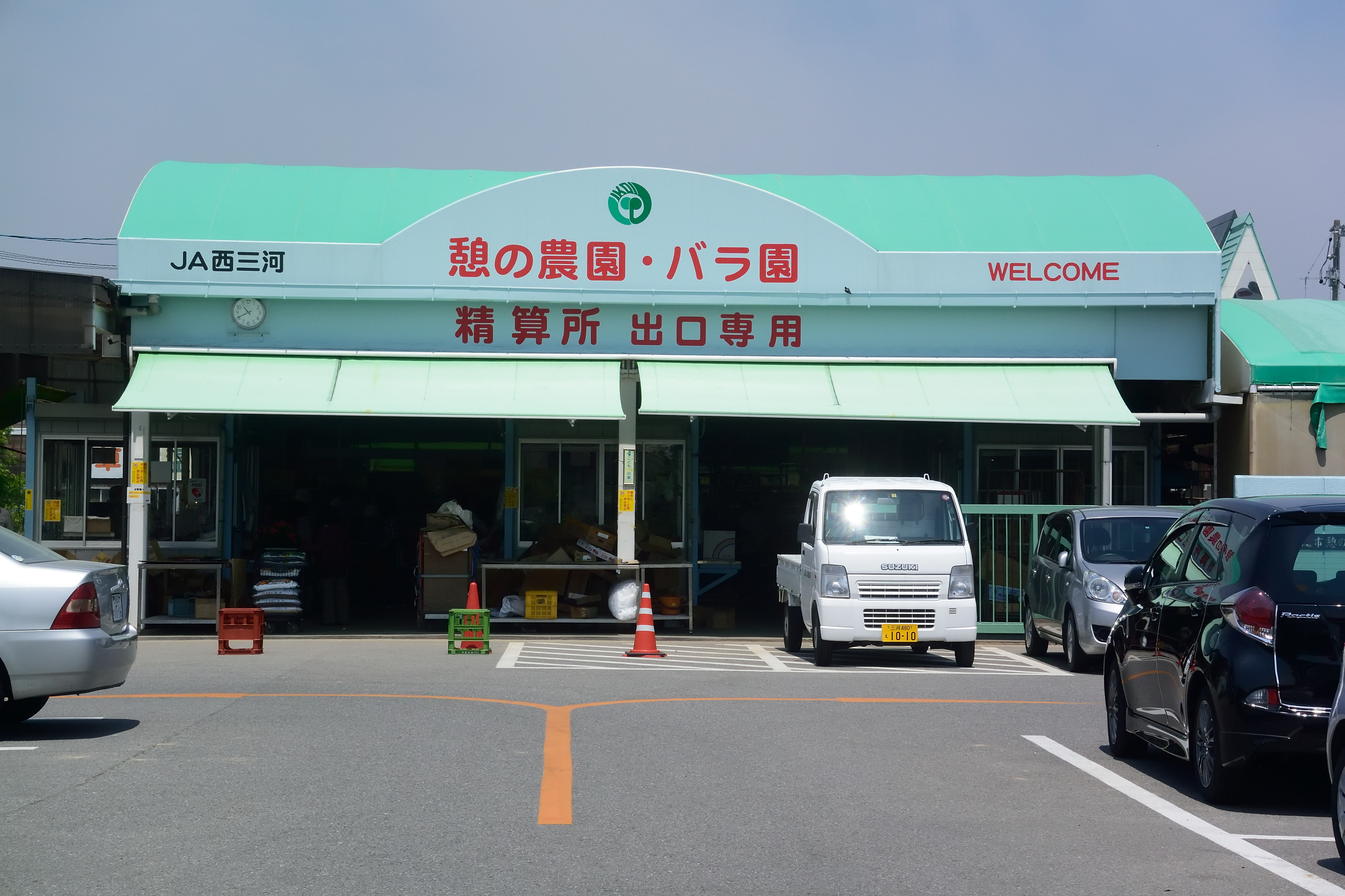 西尾市憩の農園バラ園